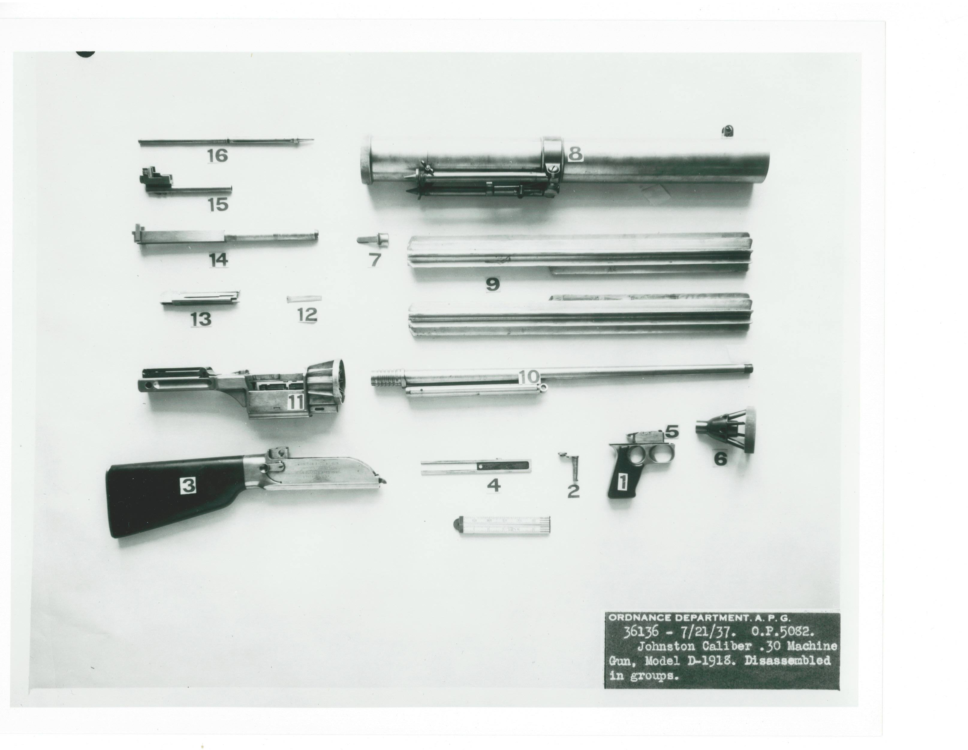 Johnston Model D1918 machine gun